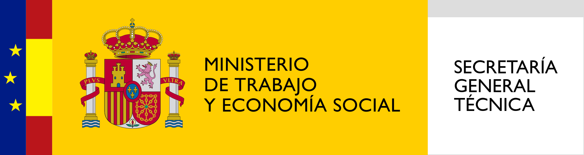 Logotipo de la Secretaría General Técnica del Ministerio de Trabajo